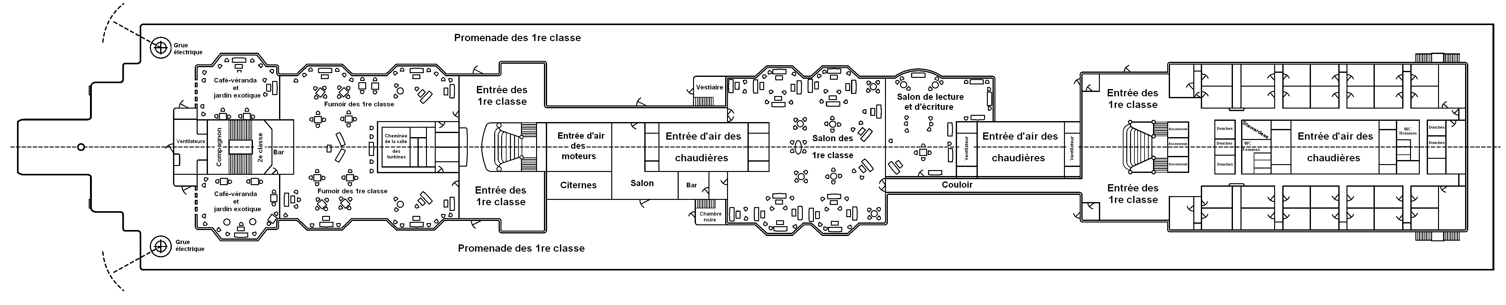 Une version française de Image:Titanic A-Deck english.png.